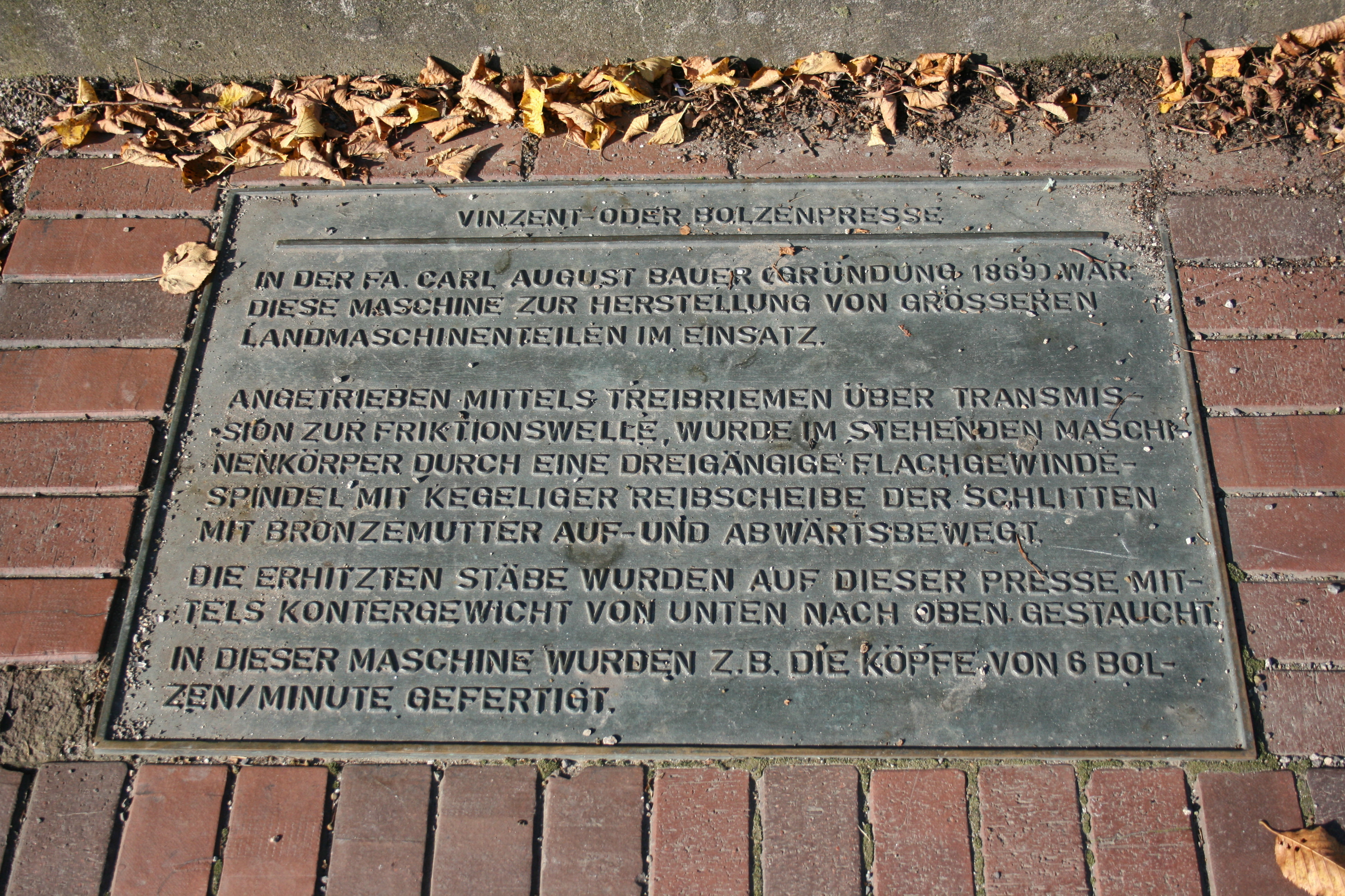 Tafel mit Erklärung zur historischen Bolzenpresse an der Hagener Straße in Ennepetal-Voerde